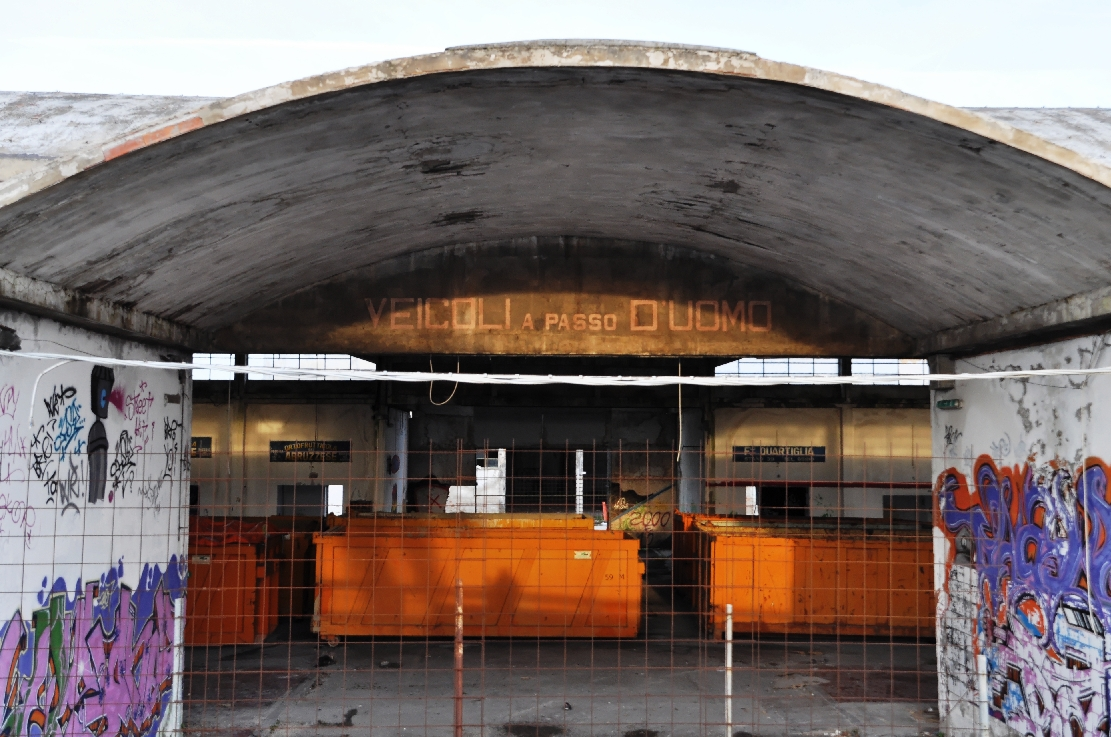 Ponte del mare Pescara Winter 2013